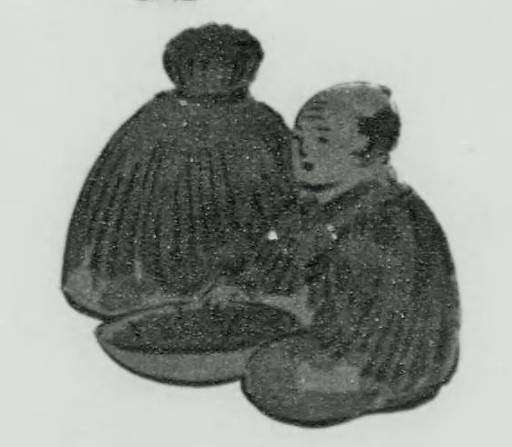 巨泉おもちや絵集 第20集 (おもちや絵版画会1919)